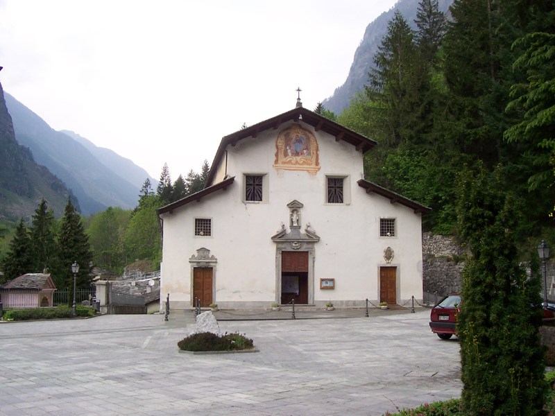 San Giacomo Filippo - Santuario della Madonna di Gallivaggio